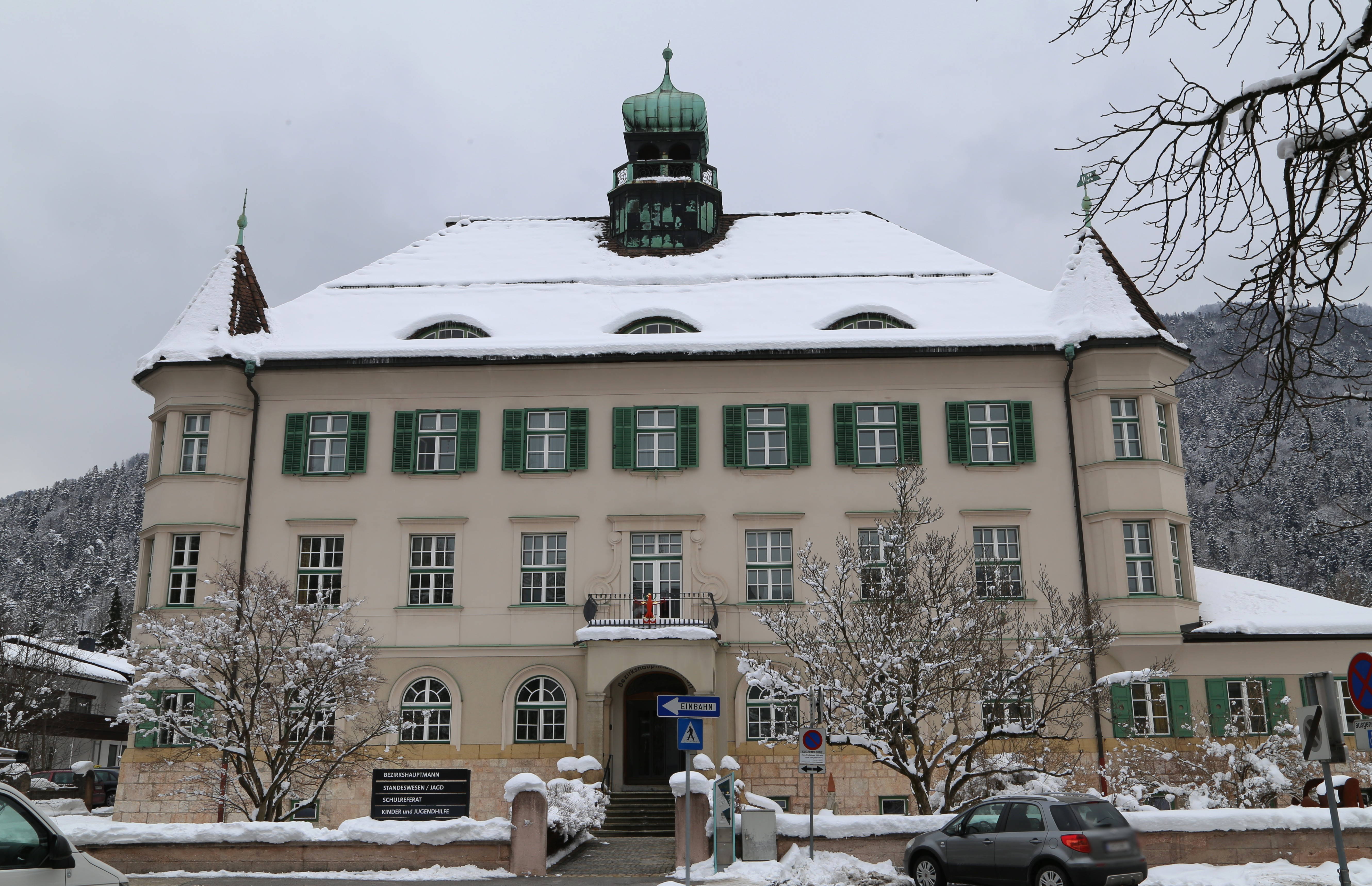 Bozner Platz 1; Alte Bezirkshauptmannschaft mit Umfassungsmauer und Laube